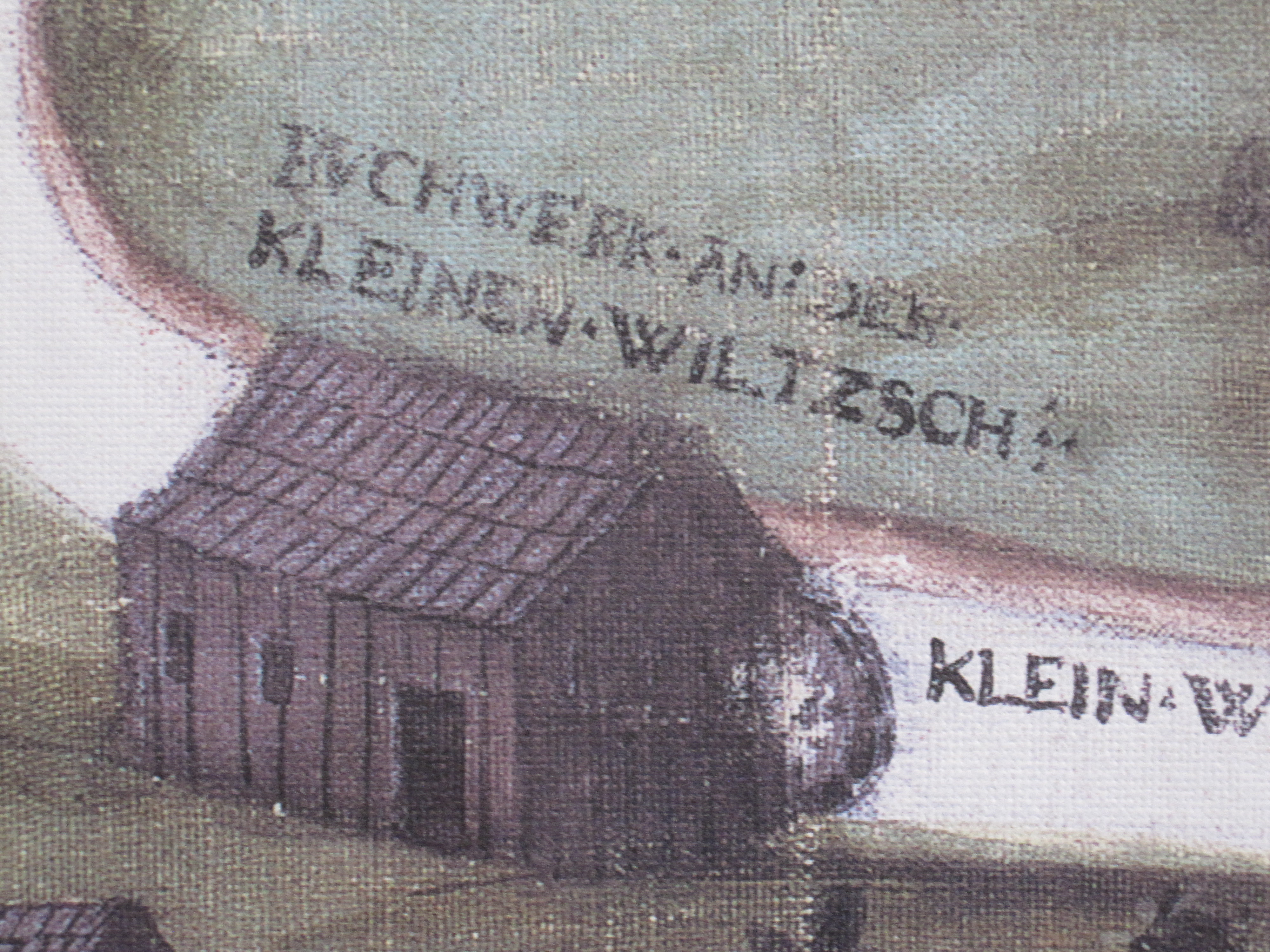 Eibenstock. Bildkarte der Bergwerke Vordere und Hintere Schmochau bei Eibenstock, um 1520. Auch Details aus der Bildkarte. Sächsisches Staatsarchiv – Bergarchiv Freiberg Nr. K 9390, ausgestellt in den musealen Räumen des Bergarchivs im Erdgeschoß des Schlosses Freudenstein in Freiberg. Der dortige Erläuterungstext zu der auf Textilgewebe gemalten Karte lautet: „Die Bildkarte ist die älteste Darstellung von Bergbauanlagen im Bergarchiv Freiberg. es handelt sich um eine Ansicht des bedeutenden Zinnbergbaugebietes südwestlich der Bergstadt Eibenstock im Westerzgebirge. Zu den bekanntesten und ertragreichsten Gruben im Umfeld der erst später gegründeten Ortschaft Carlsfeld gehörten die Gruben ‚Fleschmaul‘, ‚Spindel‘, ‚Rosszeche‘ und ‚Schmuge‘. Die auf der Karte dargestellten Bergwerke ‚Vordere und Hintere Schmo(c)hau‘ mit den dazugehörigen Aufbereitungsanlagen können durchaus mit den bei Georg Agricola erwähnten Bergwerken ‚Alte und Junge Schmuge‘ identisch sein. Vermutlich steht die Anfertigung dieser Karte im Zusammenhang mit der Darstellung von bergrechtlichen Grenzen.“ Der Text auf dem Bild-Ausschnitt lautet Puchwerk an der Wilzsch - also Pochwerk zur Erzaufbereitung. Im hell dargestellten Fuss sind die Anfangsbuchstaben von Klein(e) Wilzsch zu lesen.